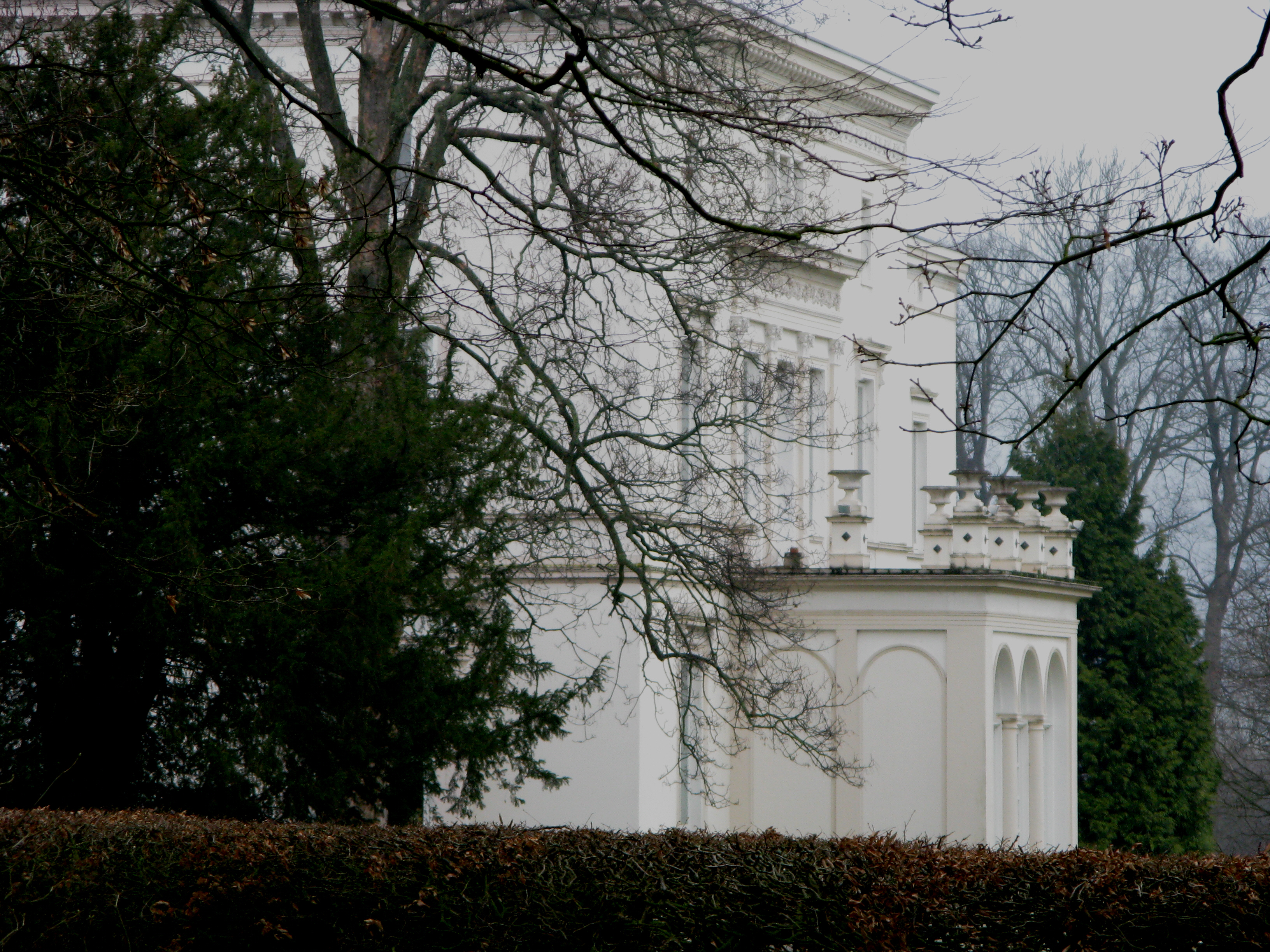 Nordostansicht